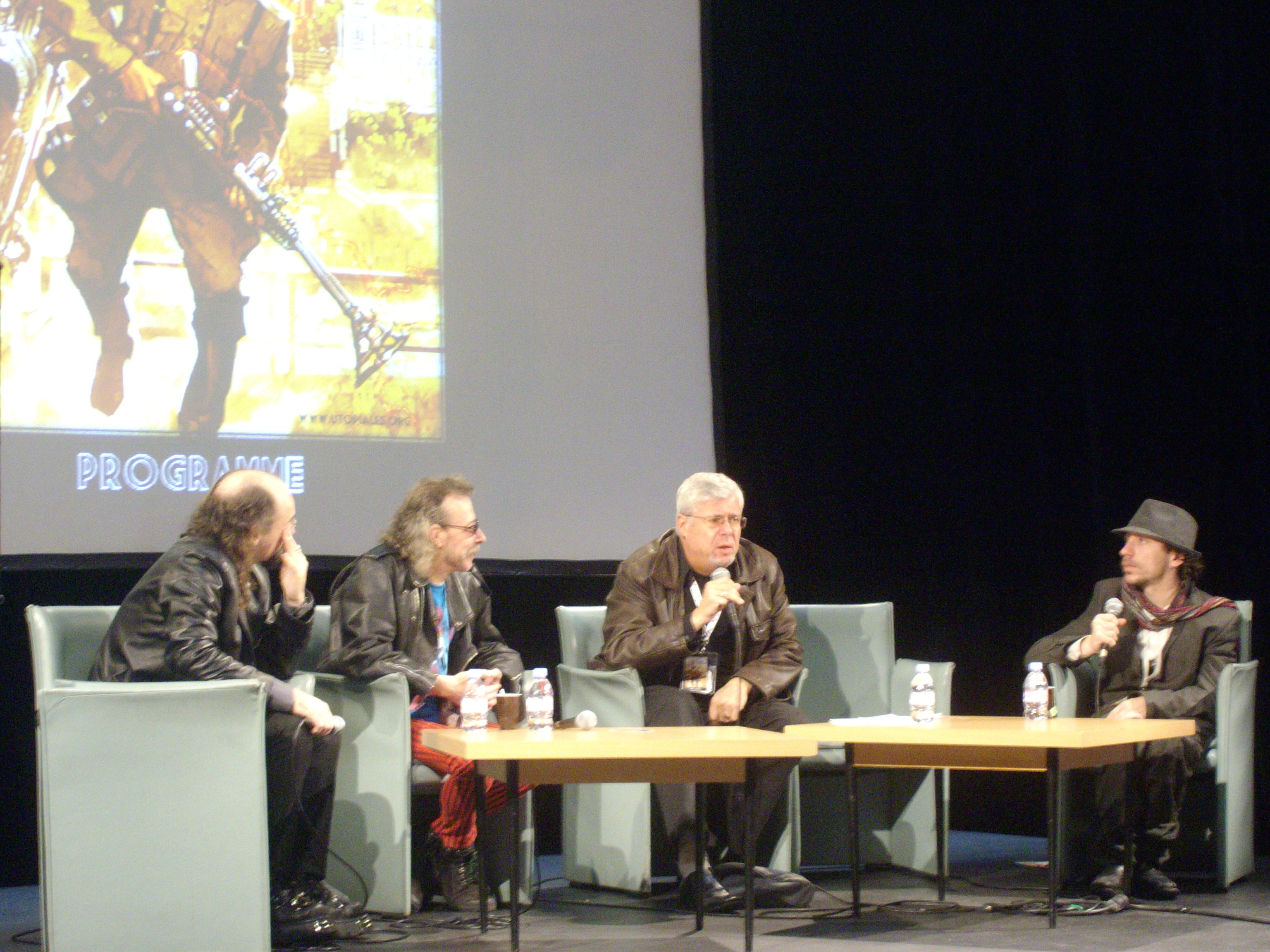 Conférence Histoire et conspirations aux Utopiales 2011, avec Lionel Davoust, Roland C Wagner, Lauric Guillaud et Antoine Motier